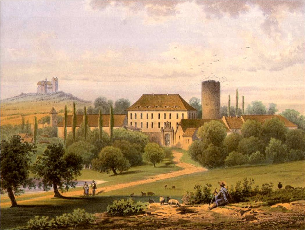 Burg Krosigk, Lithografie aus dem 19. Jahrhundert